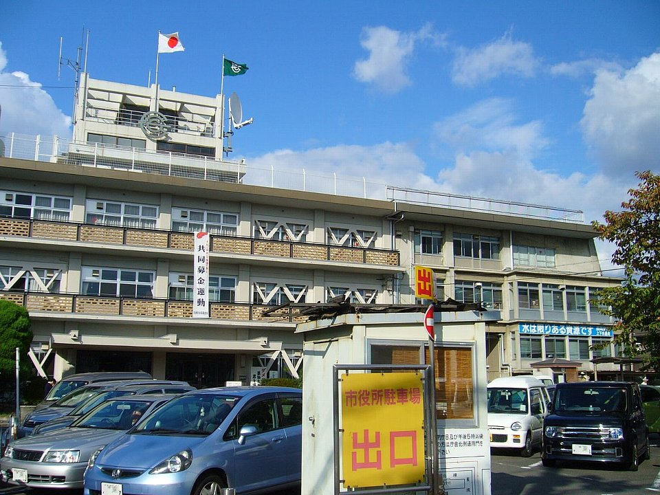 Nagaokakyo City Hall in Kyoto-fu, Japan